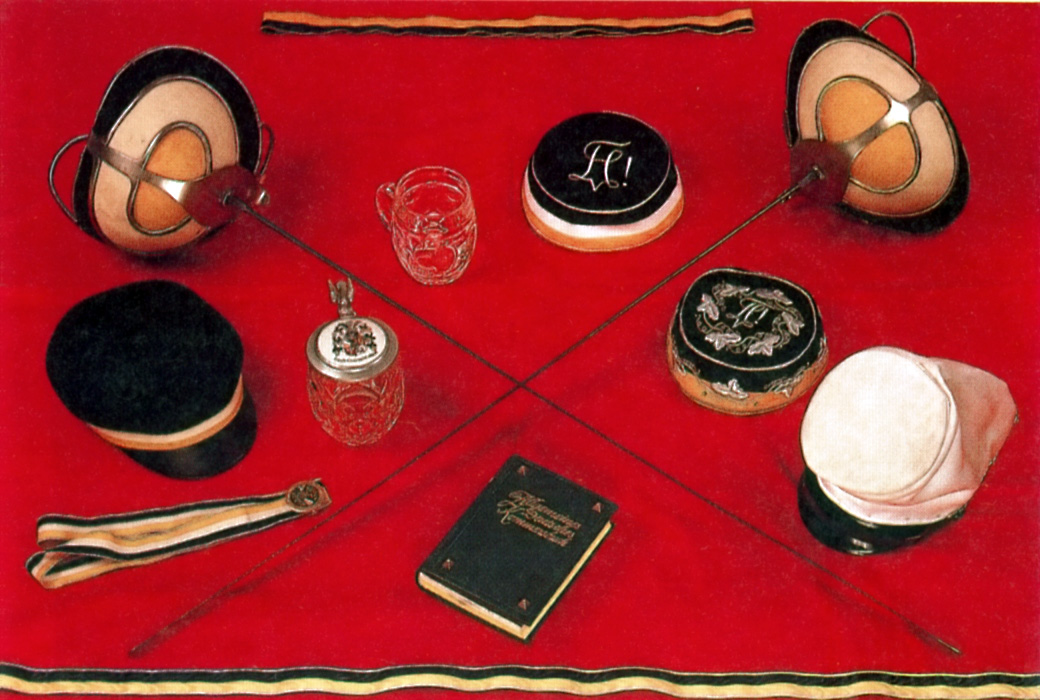 Corps Austria Couleur-2